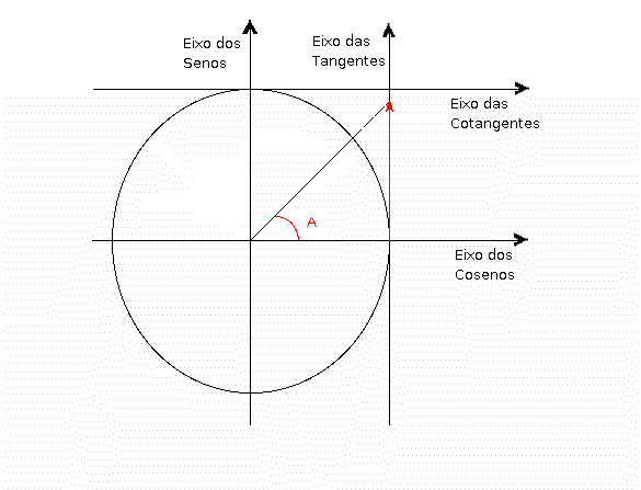 Os direitos autorais são meus e eu quero utilizar nessa página a licença de documentação livre GNU.